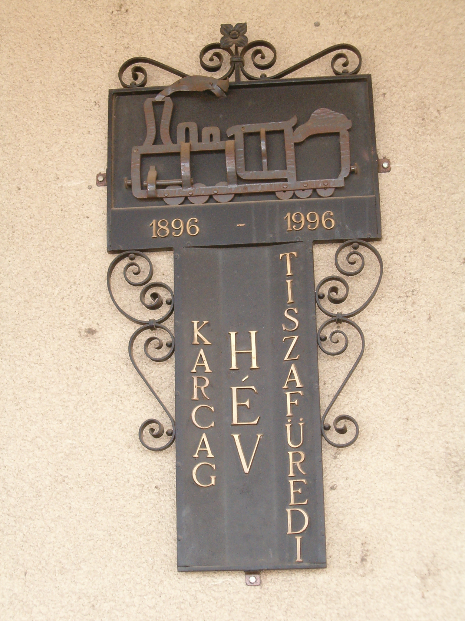 A Karcag--Tiszafüred vasútvonal megnyitásának emléktáblája a vasútállomás falán